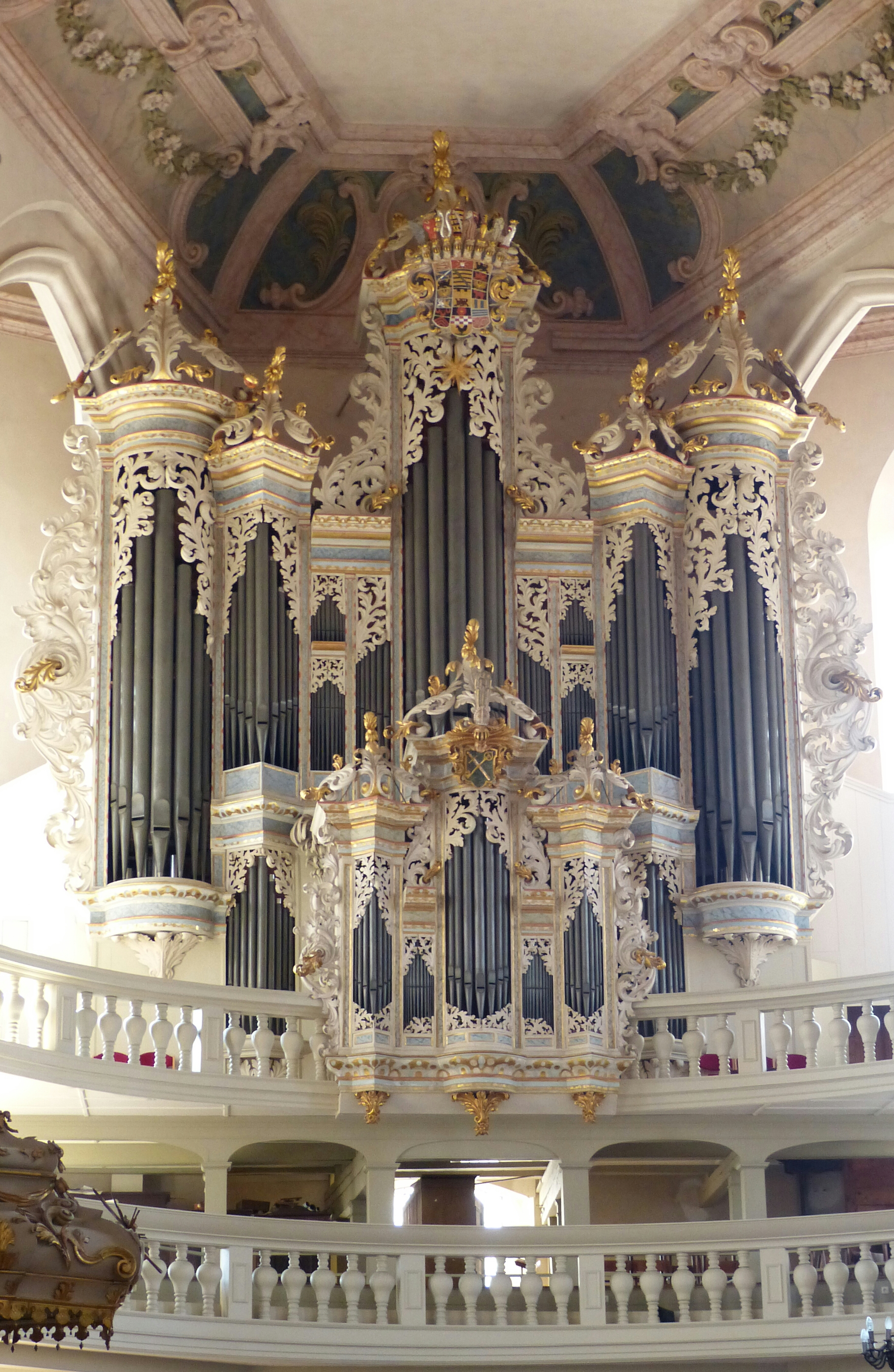 Restaurierte Hildebrandt-Orgel von 1746